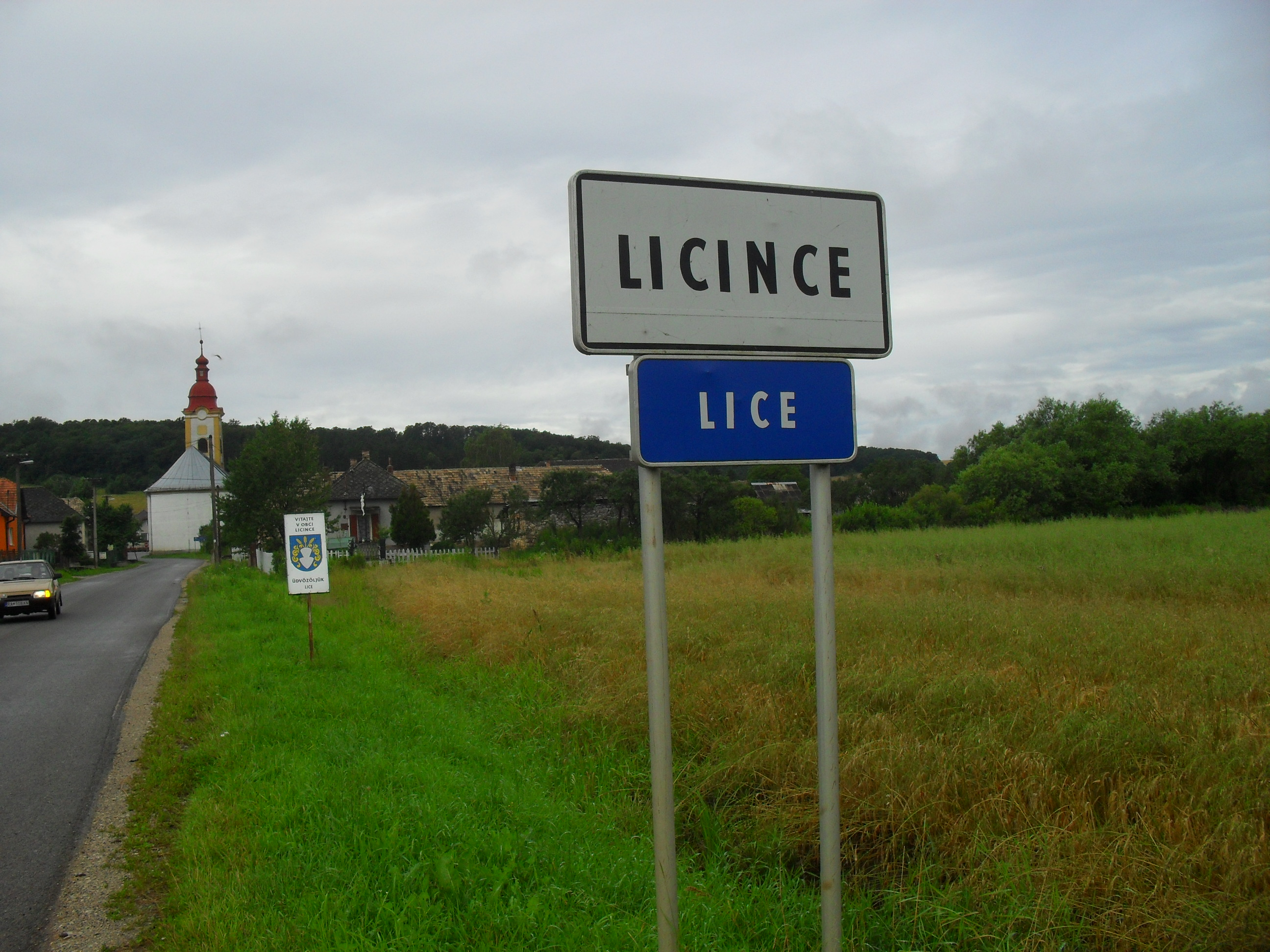 Lice - kétnyelvű helységnévtábla